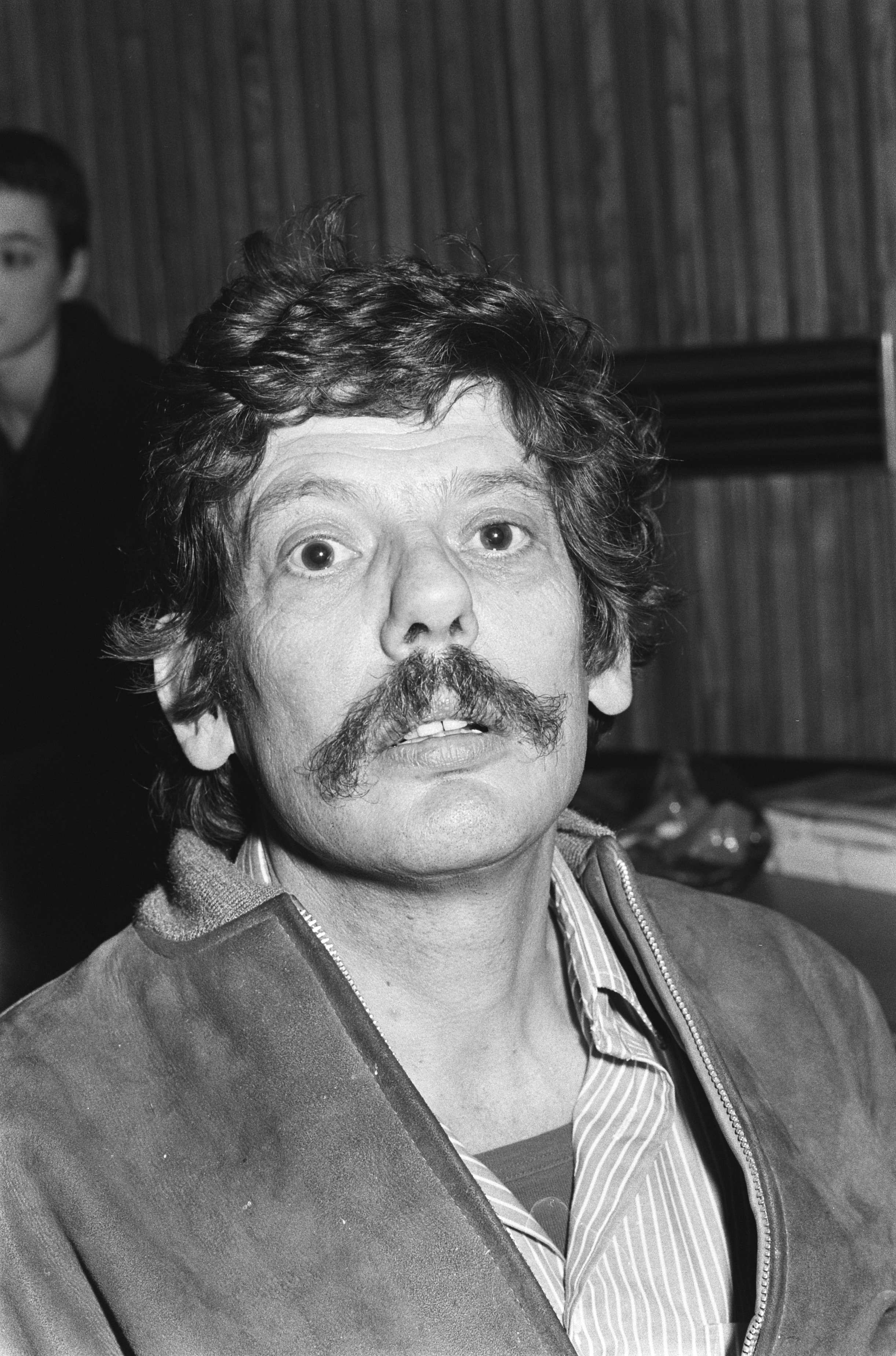 Collectie / Archief : Fotocollectie Anefo Reportage / Serie : [ onbekend ] Beschrijving : Persconferentie i.v.m. Boekenweek 1979 in Amsterdam; Janwillem v.d. Wetering (schrijver), kop Datum : 5 maart 1979 Locatie : Amsterdam, Noord-Holland Trefwoorden : boekenweken, persconferenties, schrijvers Fotograaf : Dijk, Hans van / Anefo Auteursrechthebbende : Nationaal Archief Materiaalsoort : Negatief (zwart/wit) Nummer archiefinventaris : bekijk toegang 2.24.01.05 Bestanddeelnummer : 930-1546